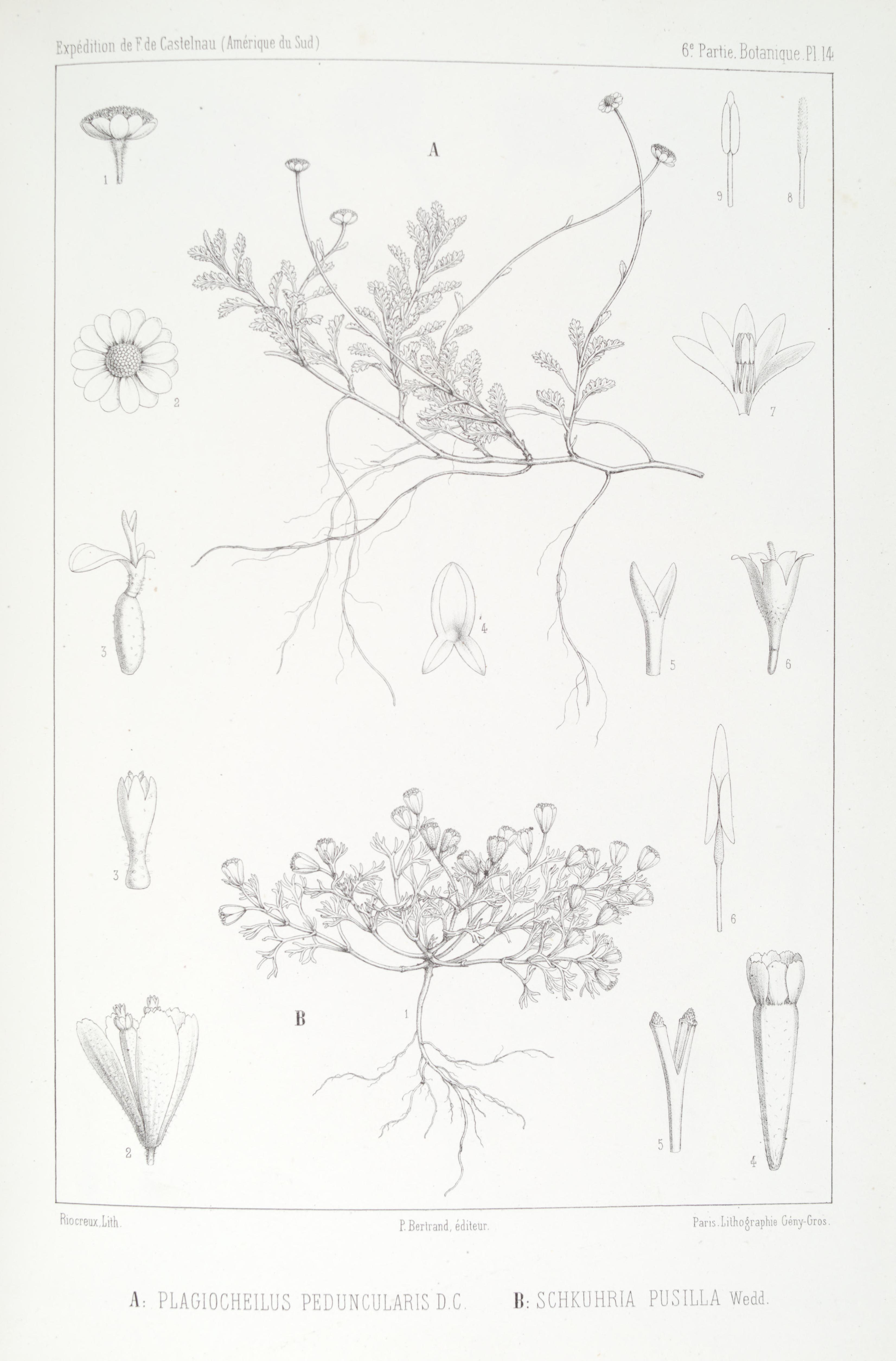 Chloris andina :essai d'une flore de la région alpine des Cordillères de l'Amérique du Sud /par H.A. Weddell.